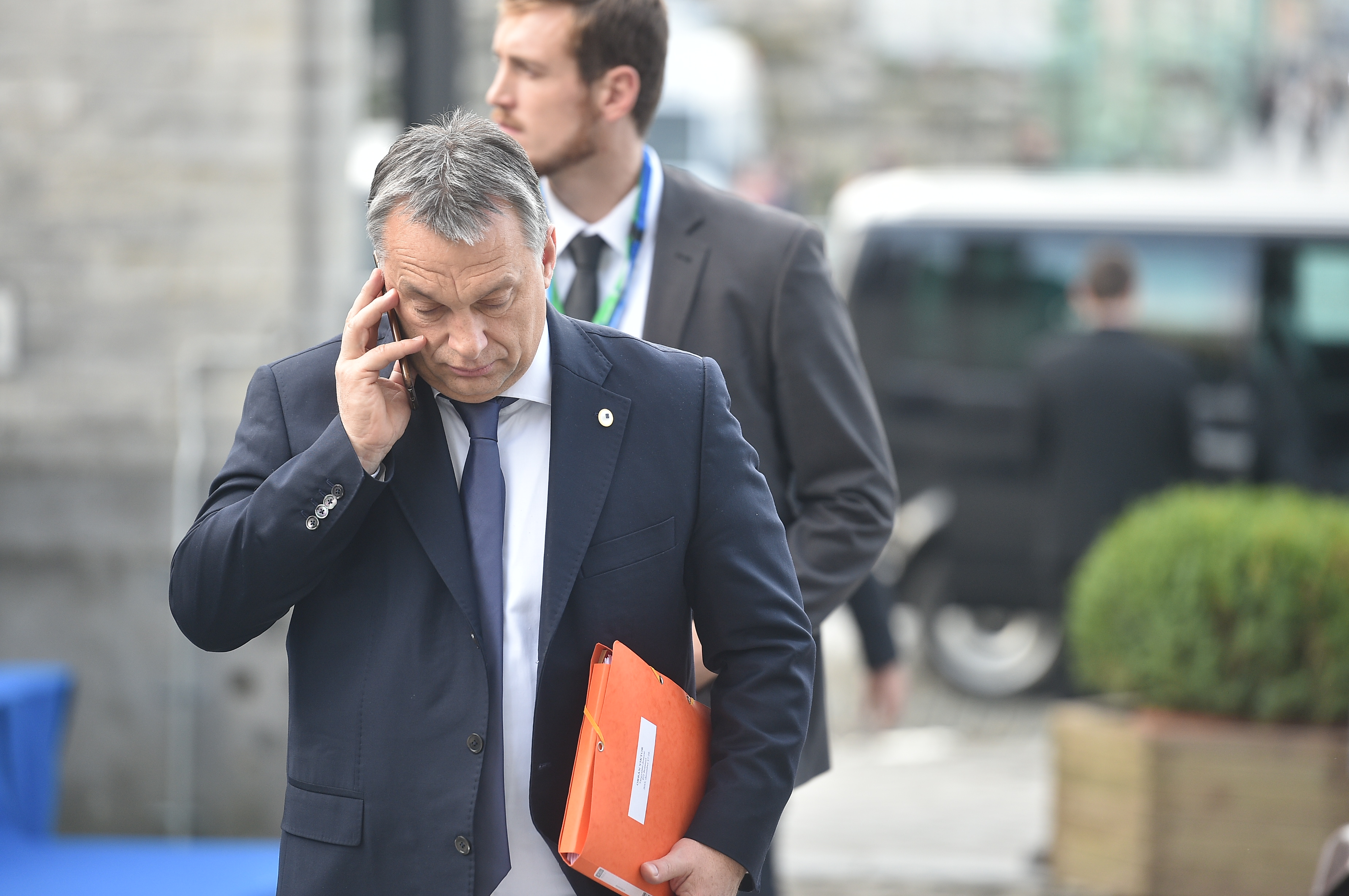 EPP Summit, December 2015